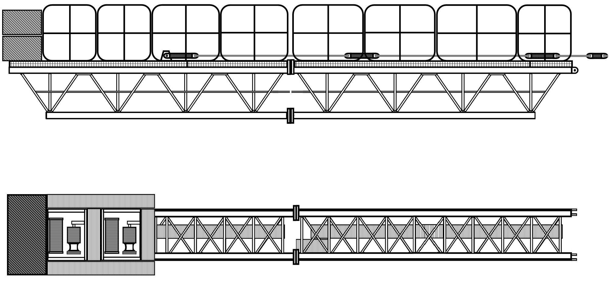 Противовесная консоль - мой чертёж